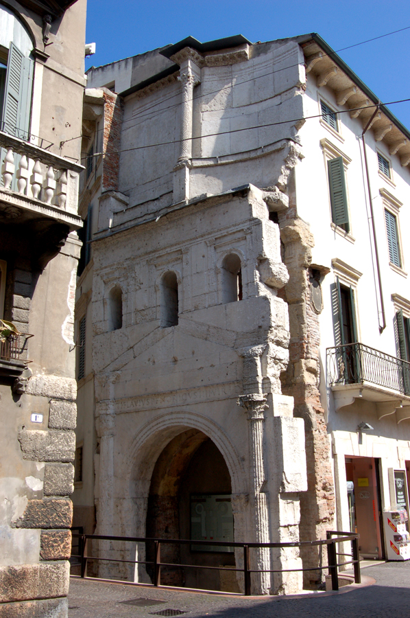 La romana porta Leoni a Verona